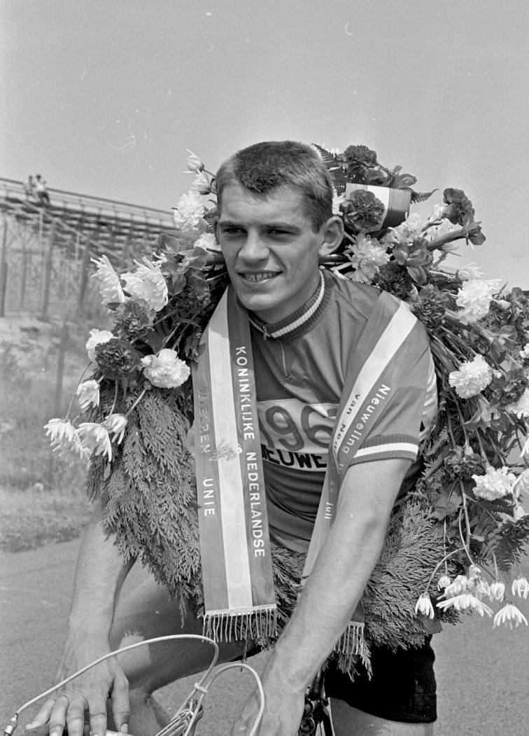 Nederlands Kampioenschap Wielrennen voor Nieuwelingen. Jan Aling werd kampioen